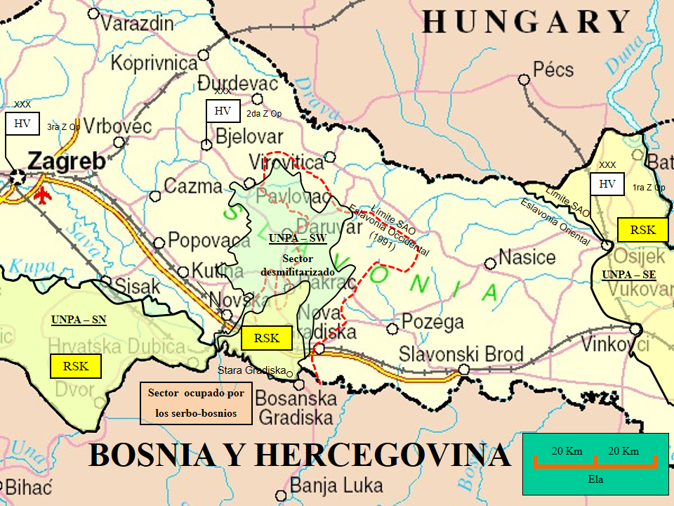 Zona de responsabilidad de UNPRROFOR/ UNCRO 1992/1995. Incluye UNPA y sector de la Krajina. Elaborado sobre la base de Srpska Vojka Krajina. Republika Srpska Krajina. The Prosecutor vs Slobodan Milosević. Documento ICTY IT-02-54-T.